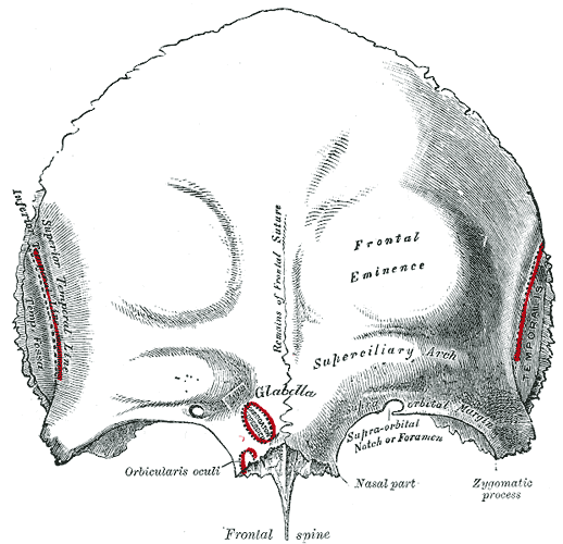 Frontal bone. Outer surface.